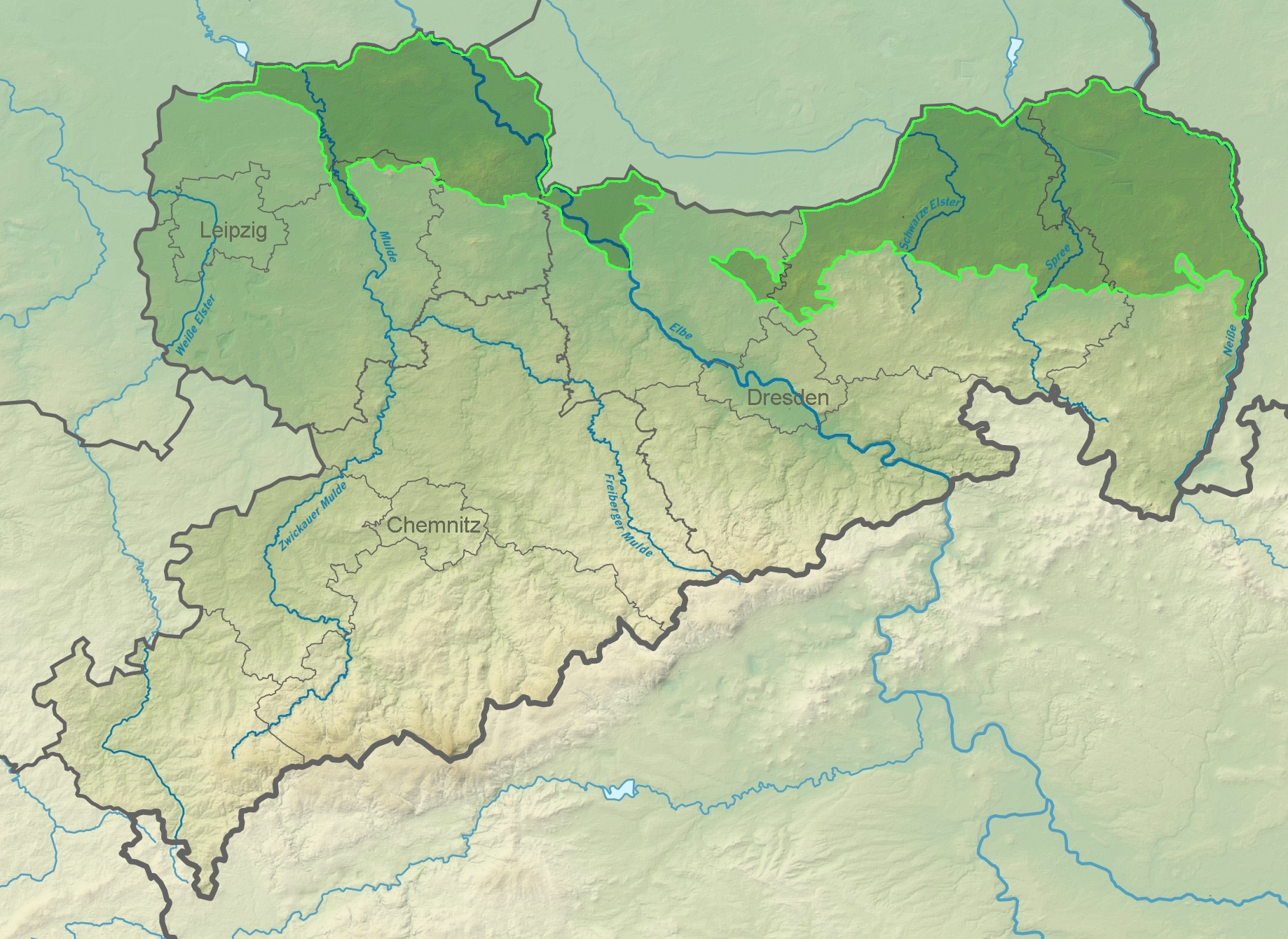 Lage der Naturregion Sächsisch-Niederlausitzer Heideland nach der Systematik der Naturräume in Sachsen (Quellen siehe dort).